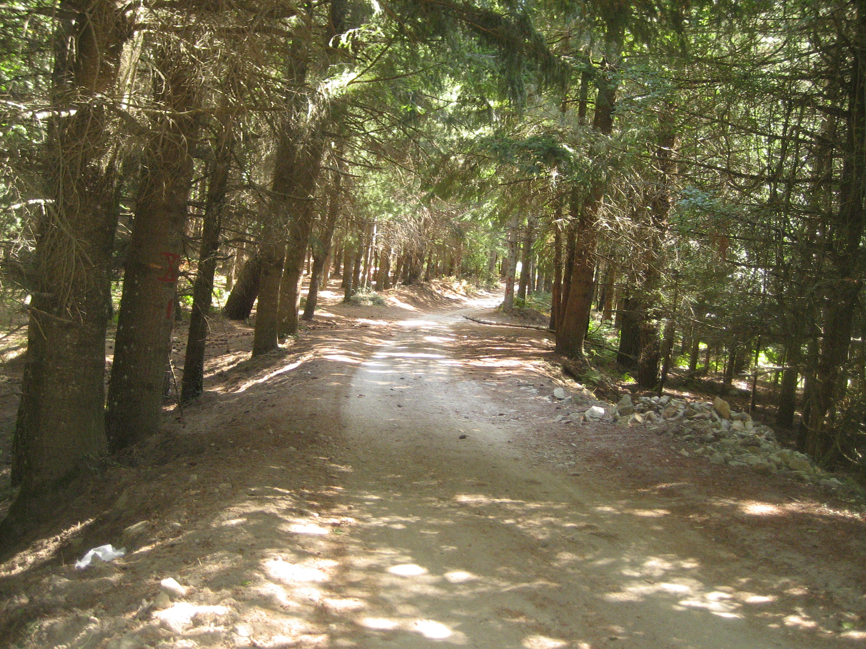 Sentiero_a_ferdinandea